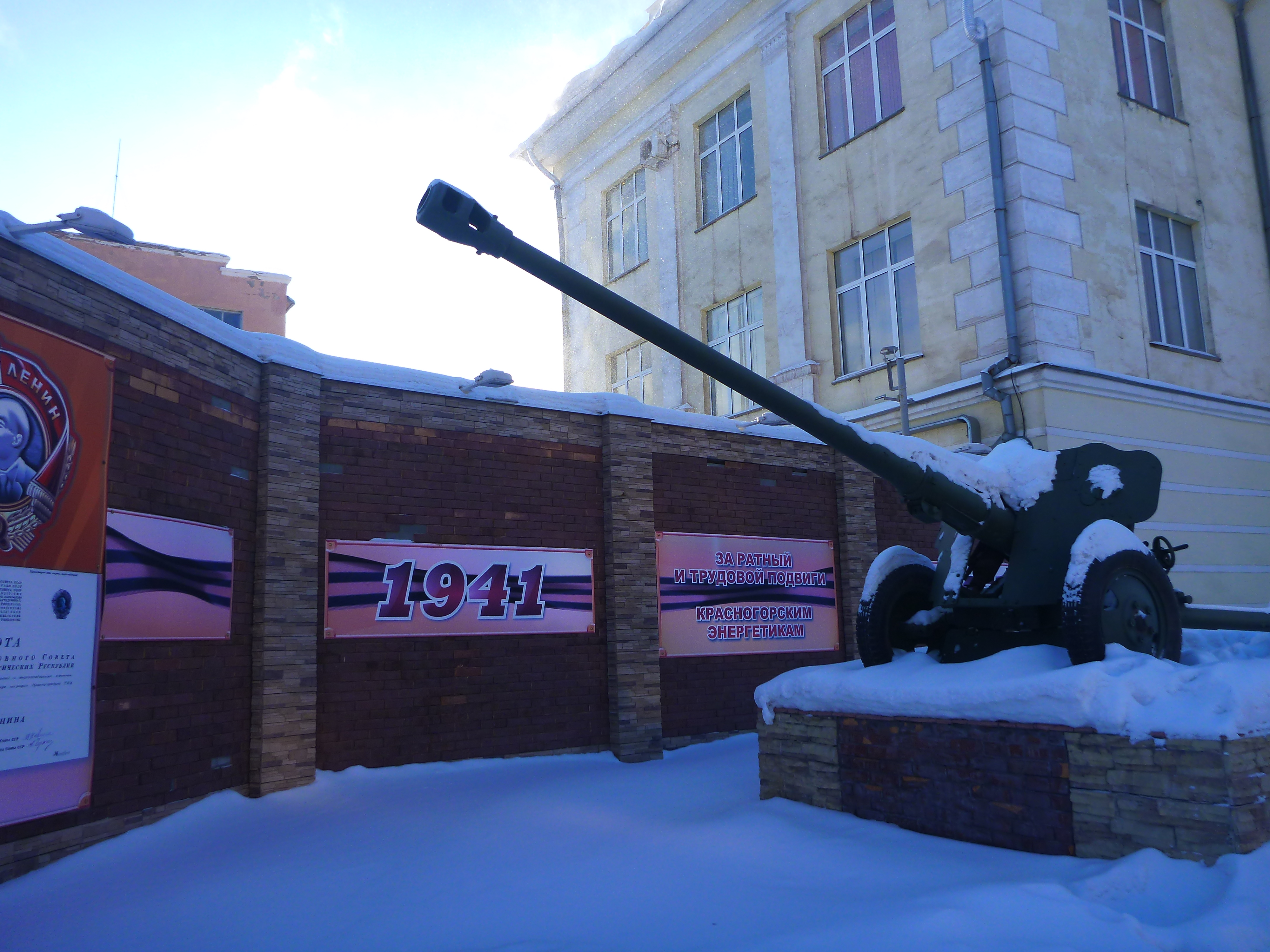 В мае 2010 года на предзаводской площади открыт мемориал «За ратный и трудовой подвиг Красногорским энергетикам 1941—1945».